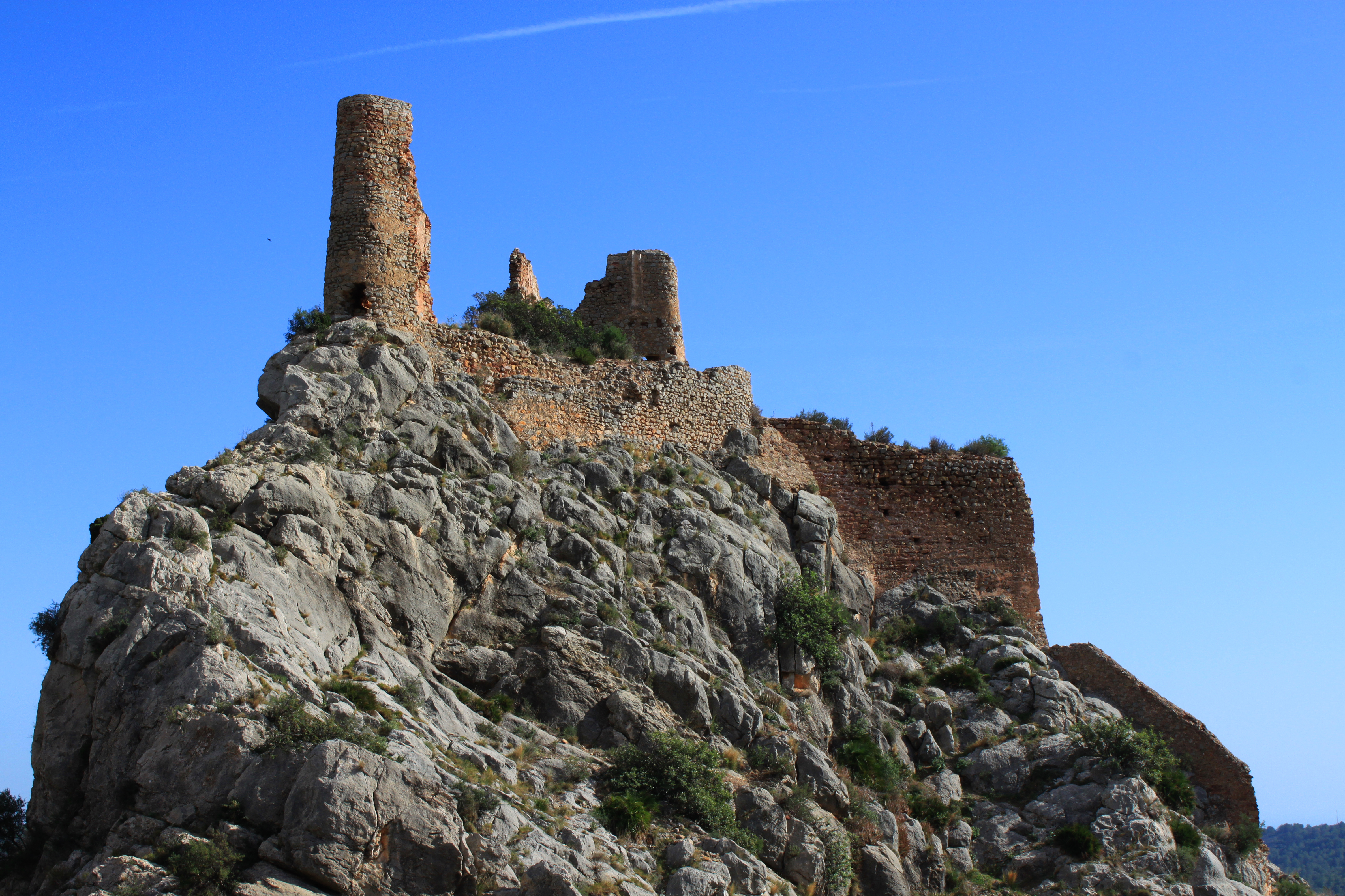 Castillo de Borriol. Situado sobre un promontorio calizo a 330 metros sobre el nivel del mar el castillo de Borriol es de fábrica musulmana aunque existen indicios de que pudiera ser anterior debido a la aparición de restos íberos y romanos en sus proximidades. Se observa la torre principal y la segunda cerca, muy modificada tras la ocupación cristiana de la fortaleza. Borriol, provincia de Castellón, Comunidad Valenciana, España.